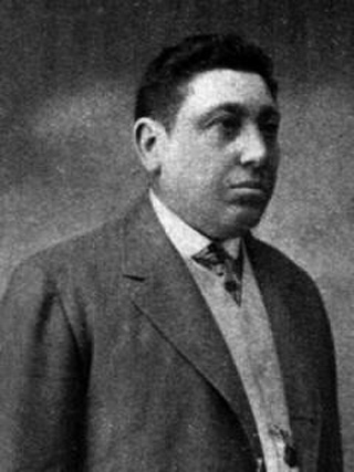 Foto di Andrea Capparelli, fisiologo (1854 – 1921).